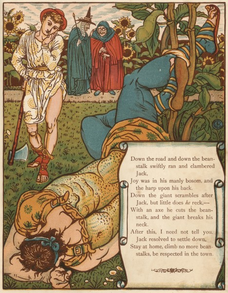 Гравюры по рисункам Крейна к сказкам «Синяя Борода», «Спящая Красавица», «Красная Шапочка», «Джек и бобовый стебель»